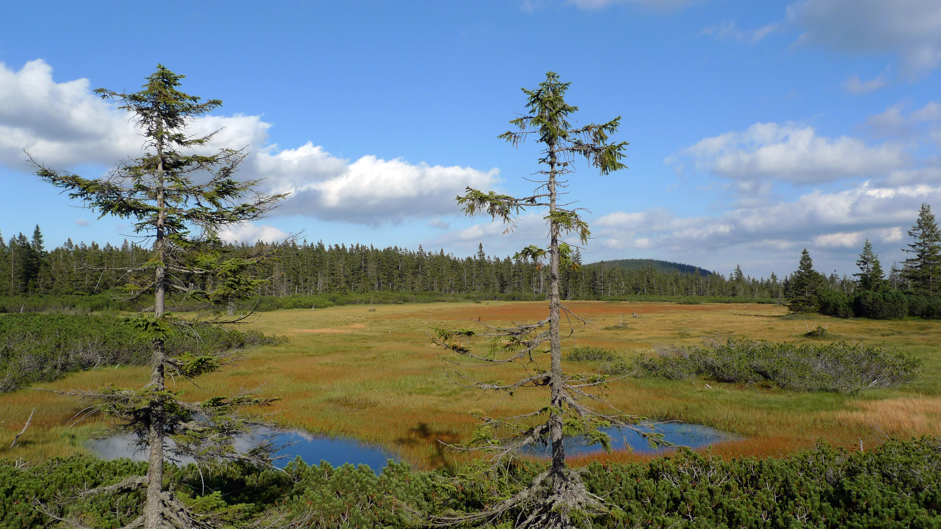 Černohorské rašeliniště na Černé hoře v Krkonoších